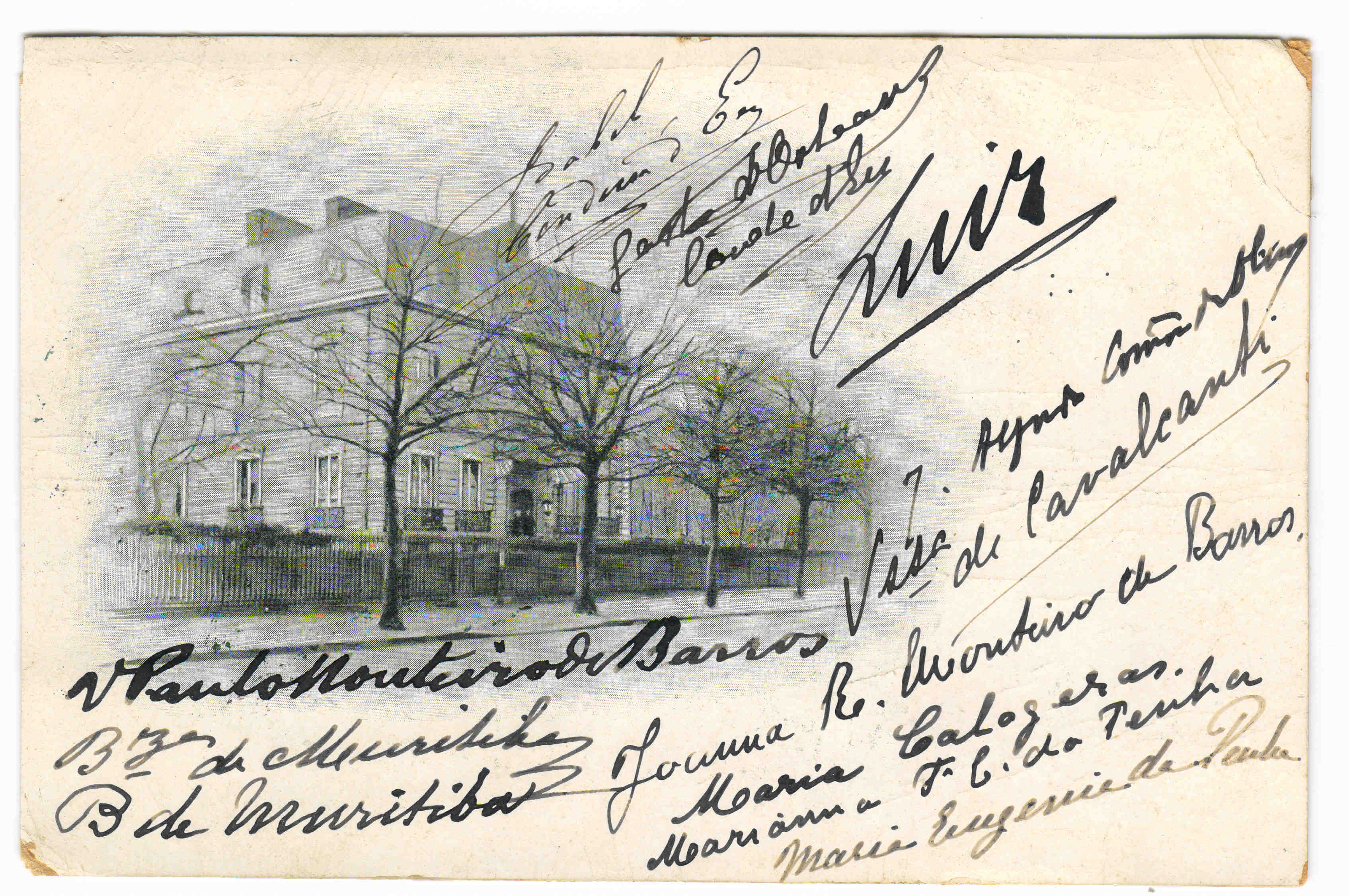 Cartão com a casa dos Condes D'Eu em Boulogne-sur-Seine (atualmente Boulogne-Billancourt), nos arredores de Paris, uma das residências do casal durante o exílio. O cartão contém a assinatura da Princesa Isabel (Condessa d'Eu) e do Conde d'Eu entre outras.(Frente).